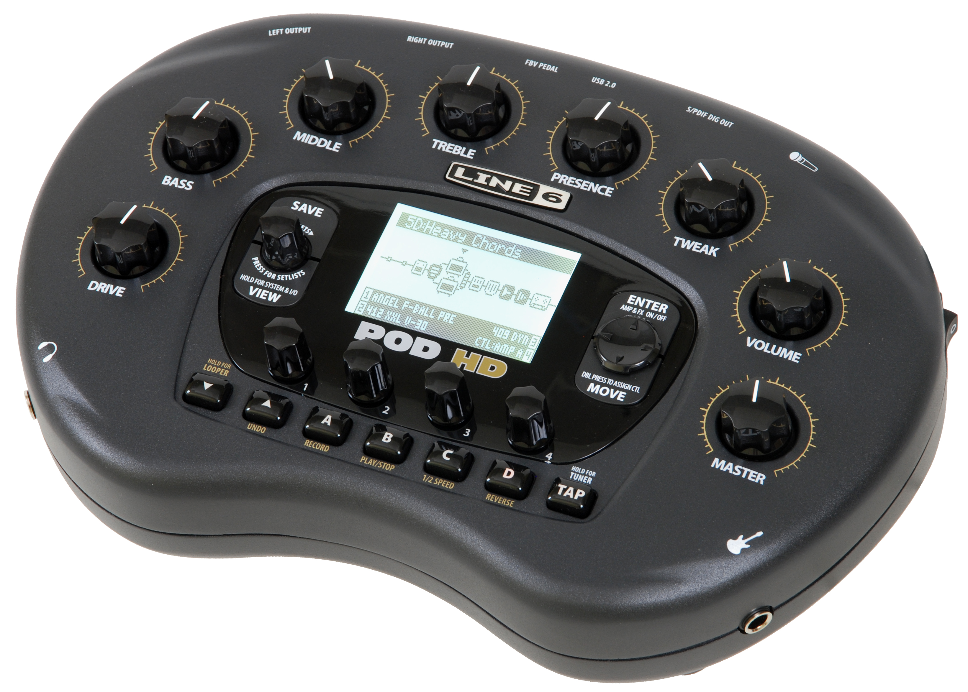 Procesor gitarowy POD HD Bean firmy Line 6